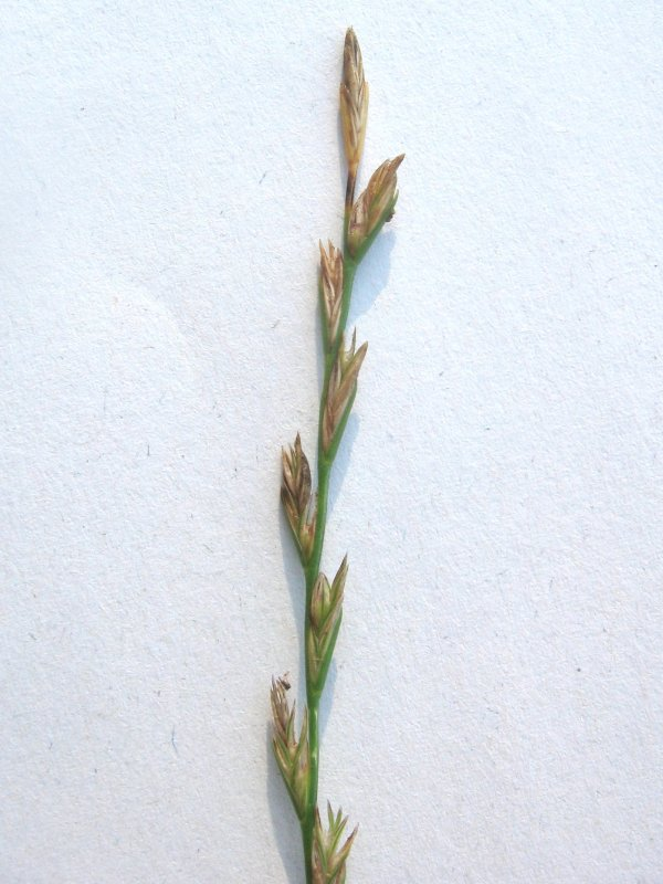 Deutsches Weidelgras Lolium perenne